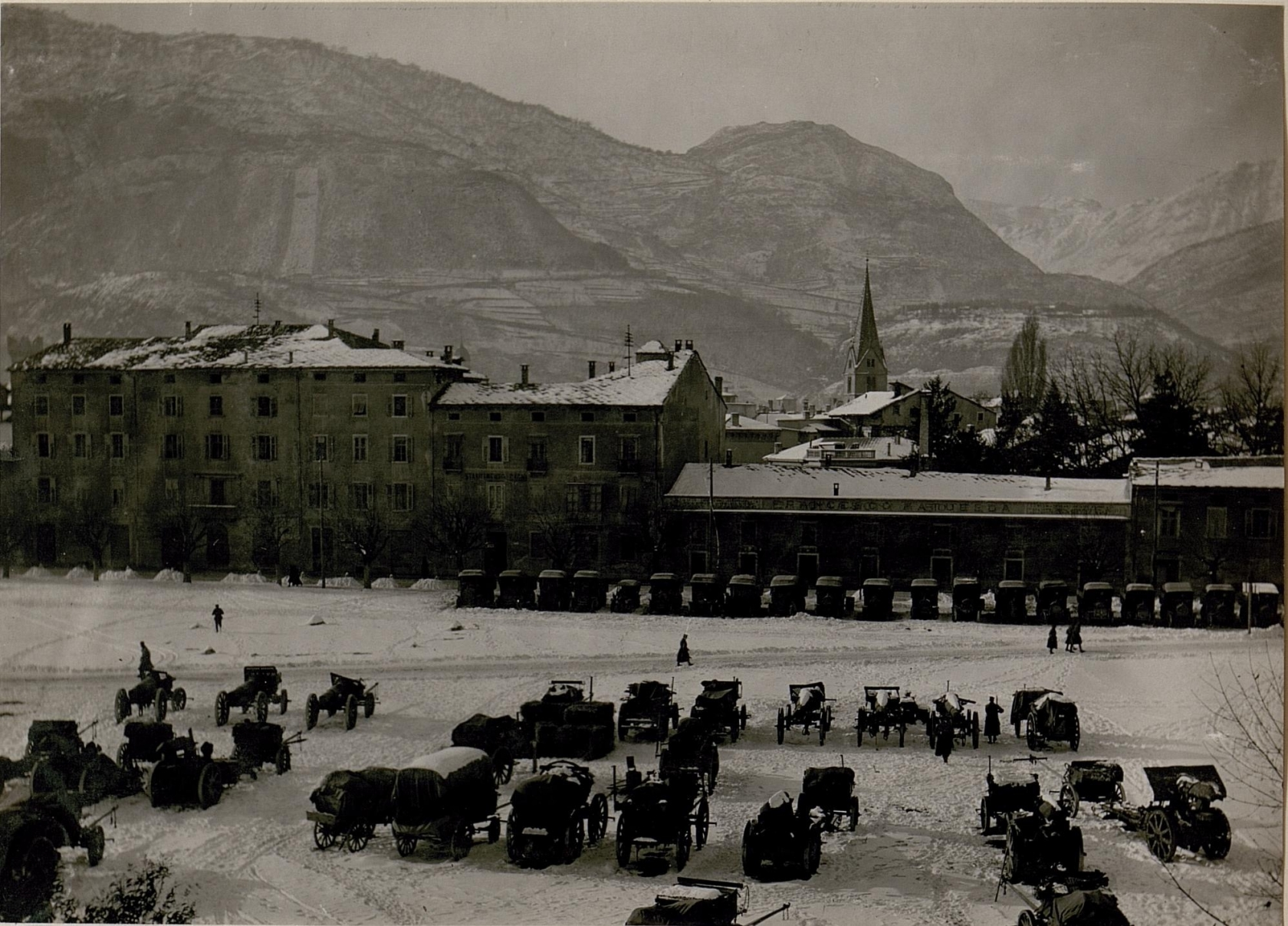 Trient: Waffenplatz.